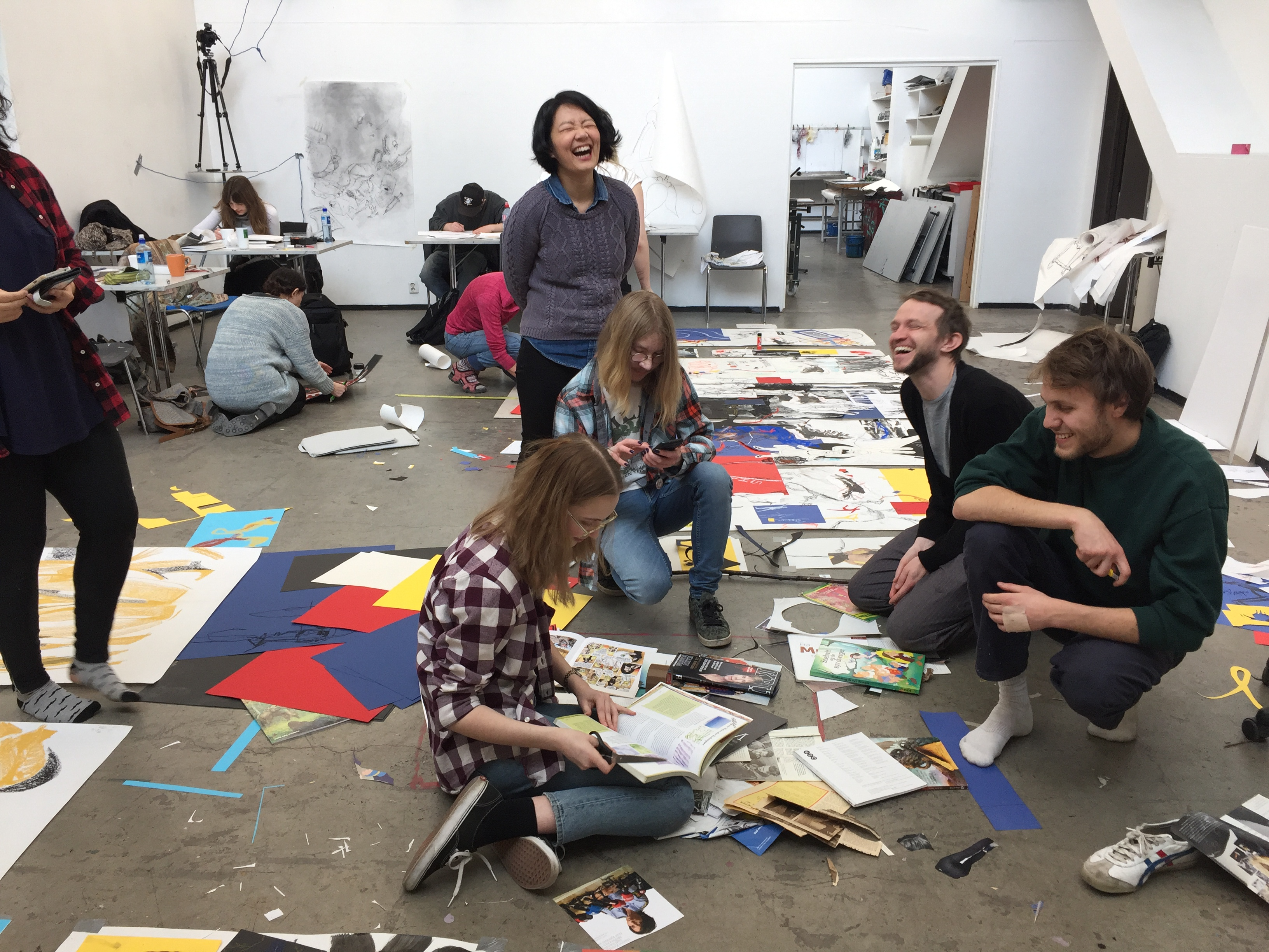 Studentmiljø på Einar Granum Kunstfagskole.